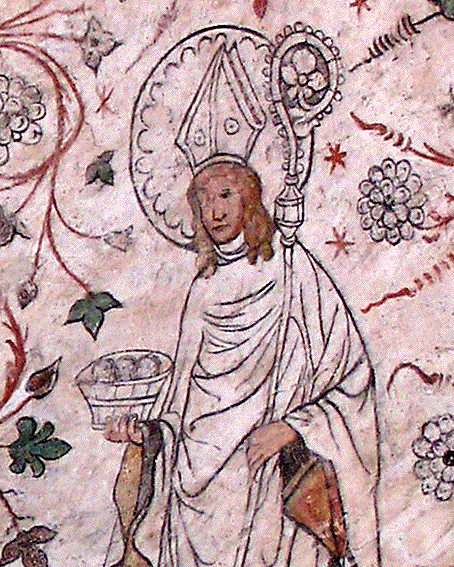 Bild klafui